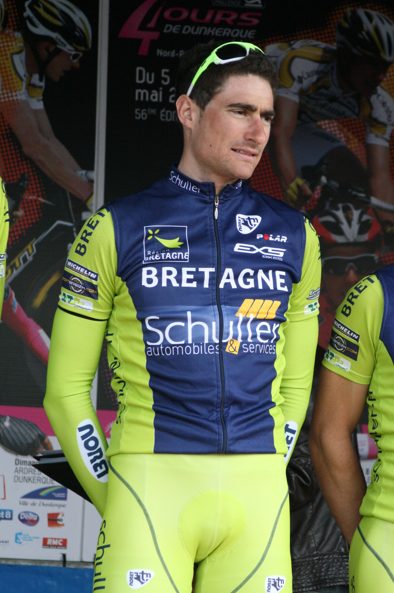 Gael Malacarne lors de la présentation des équipes des 4 jours de Dunkerque 2010